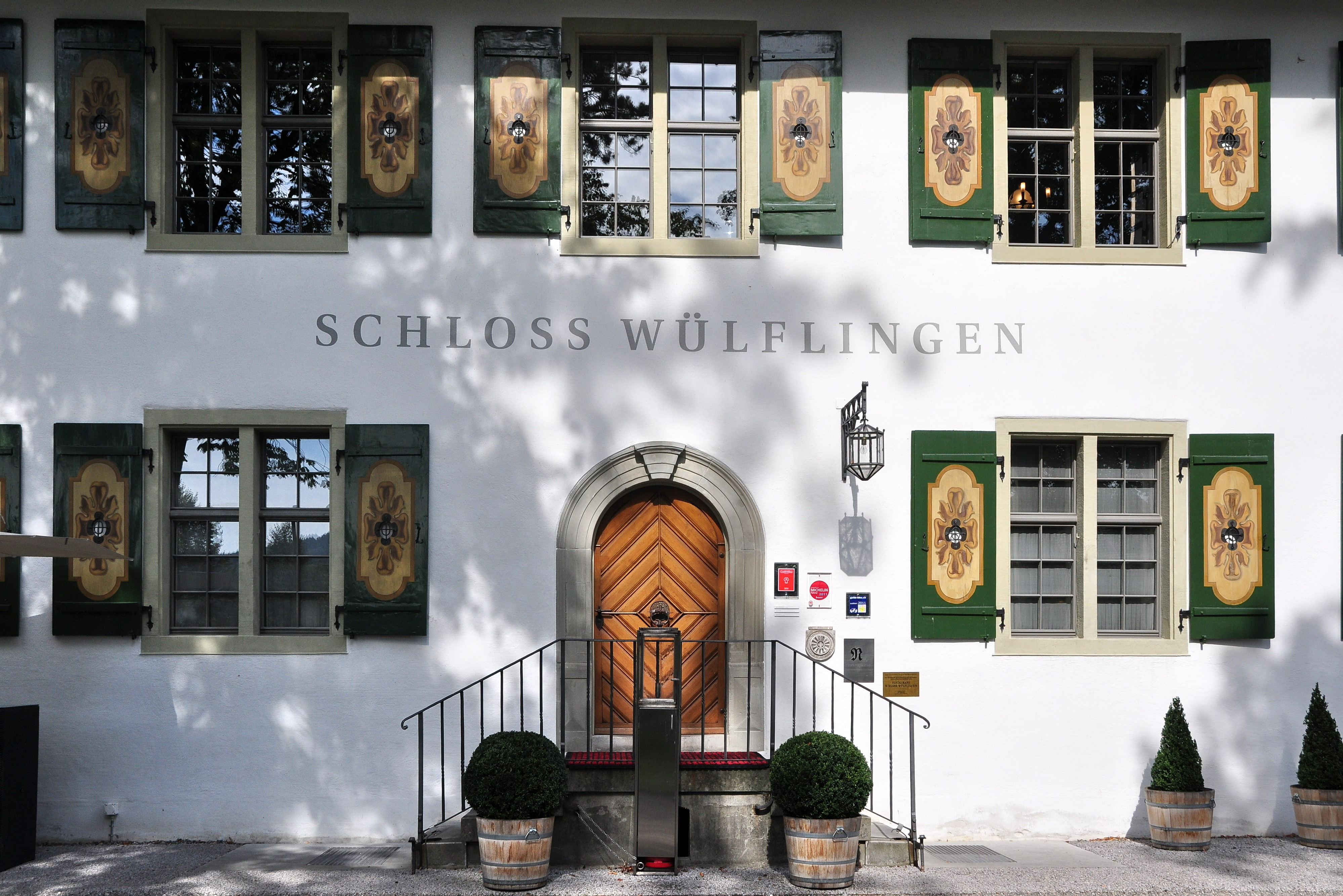 Schloss Wülflingen mit Waschhaus und Scheune, Wülflingerstrasse 214 in Winterthur (Switzerland)